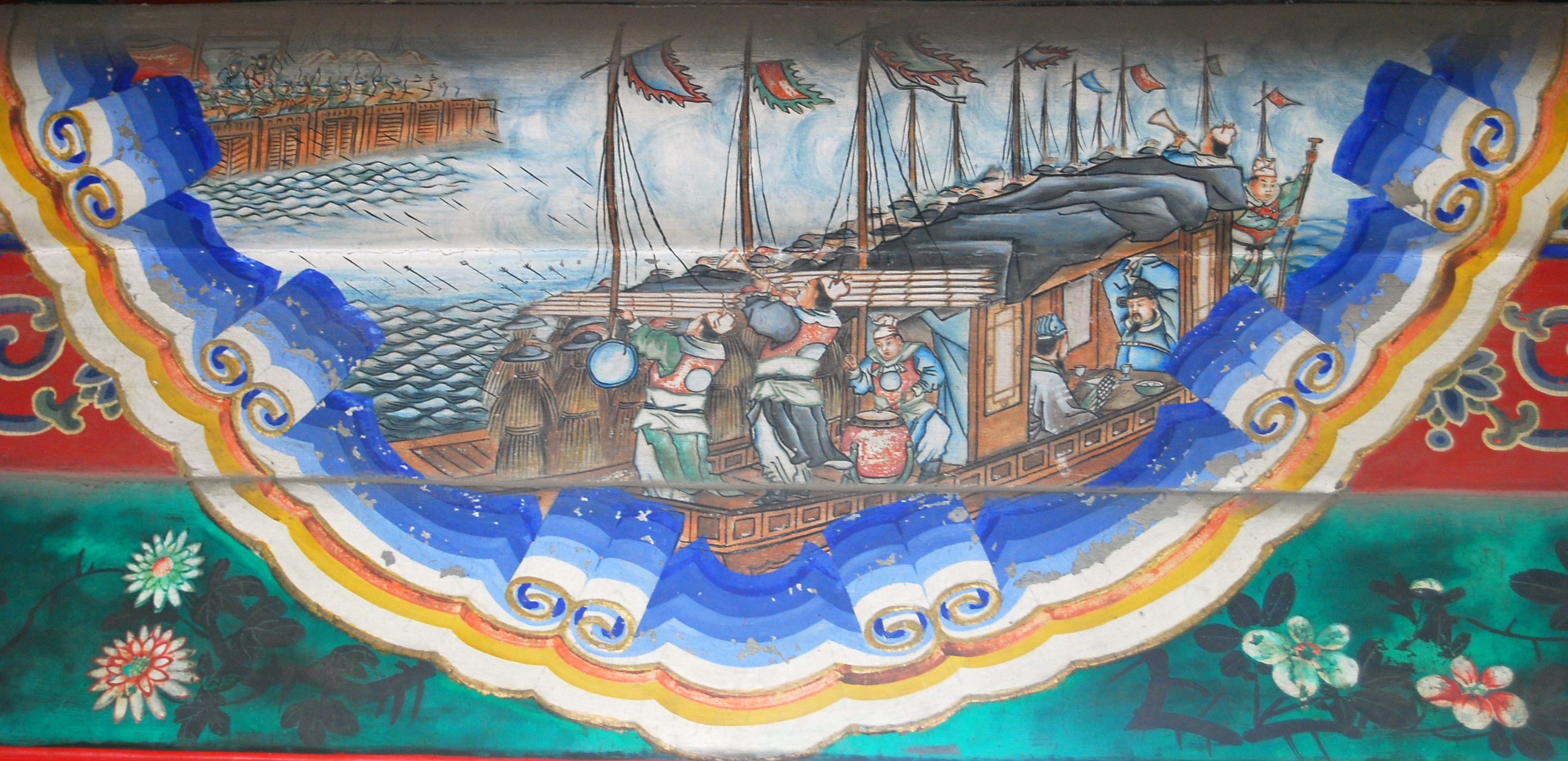 Dùng thuyền cỏ dụ tên - Di Hòa Viên